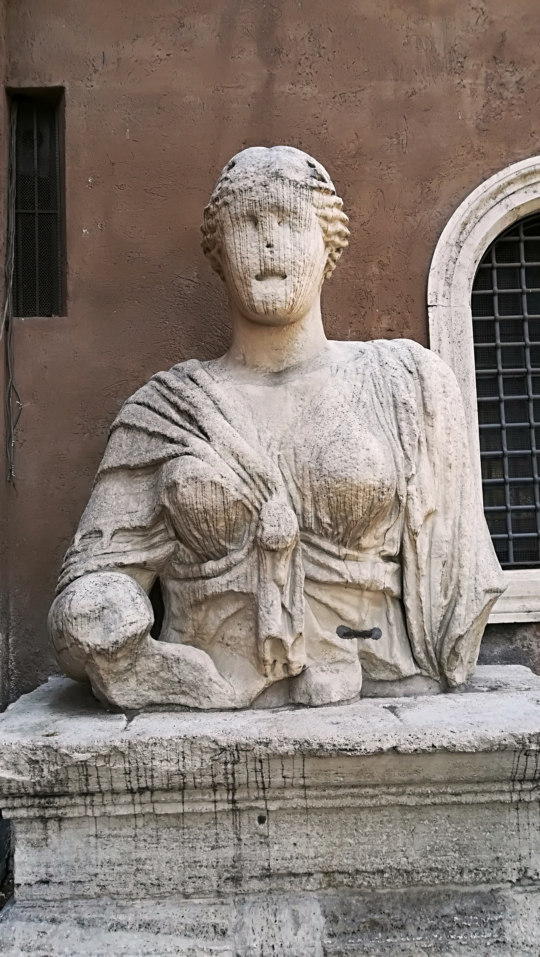 Busto di madama Lucrezia ,Roma This is a photo of a monument which is part of cultural heritage of Italy.